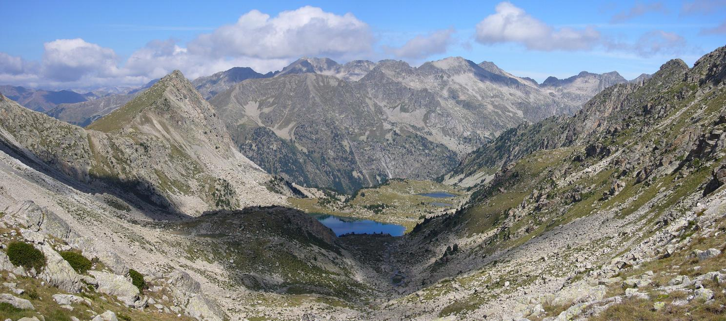 Vall de Dellui vista des de la Collada de Dellui; la Vall de Boí, Alta Ribagorça, Catalunya